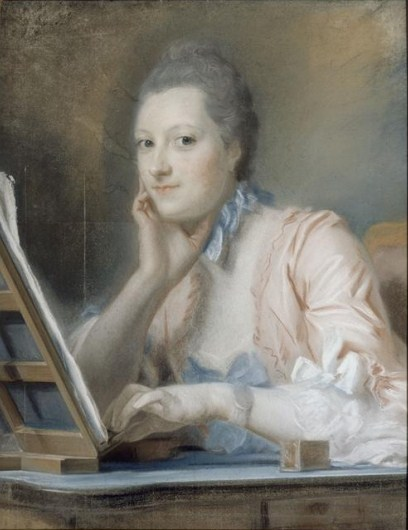 Artist Maurice Quentin de La Tour (1704–1788) DescriptionFrench painterDate of birth/death5 September 170417 February 1788Location of birth/deathSaint-QuentinSaint-QuentinWork locationParisAuthority control VIAF: 49488081 ISNI: 0000 0001 0899 524X ULAN: 500001160 LCCN: n86021550 WGA: LA TOUR, Maurice Quentin de WorldCat TitleMadame de La PouplinièreDescription Françoise Catherine Thérèse Boutinon des Hayes (1714-1756), première épouse du fermier général Alexandre Jean-Joseph Le Riche de La Pouplinière (1693-1762) Datecirca 1741Mediumpastel on paperDimensions680 × 530 mm (26.77 × 20.87 in)Current location Musée Antoine-Lécuyer Native nameMusée Antoine-LécuyerLocationSaint-QuentinEstablished1886Website control Authority control VIAF: 146176211 ISNI: 0000 0001 2111 3782 SUDOC: 026548550 BNF: 11877526w Museofile: M0793 ReferencesLT21Source/Photographer[1]; photographe : Mathieu Rabeau Françoise Catherine Thérèse Boutinon des Hayes (1714-1756), première épouse du fermier général Alexandre Jean-Joseph Le Riche de La Pouplinière (1693-1762)